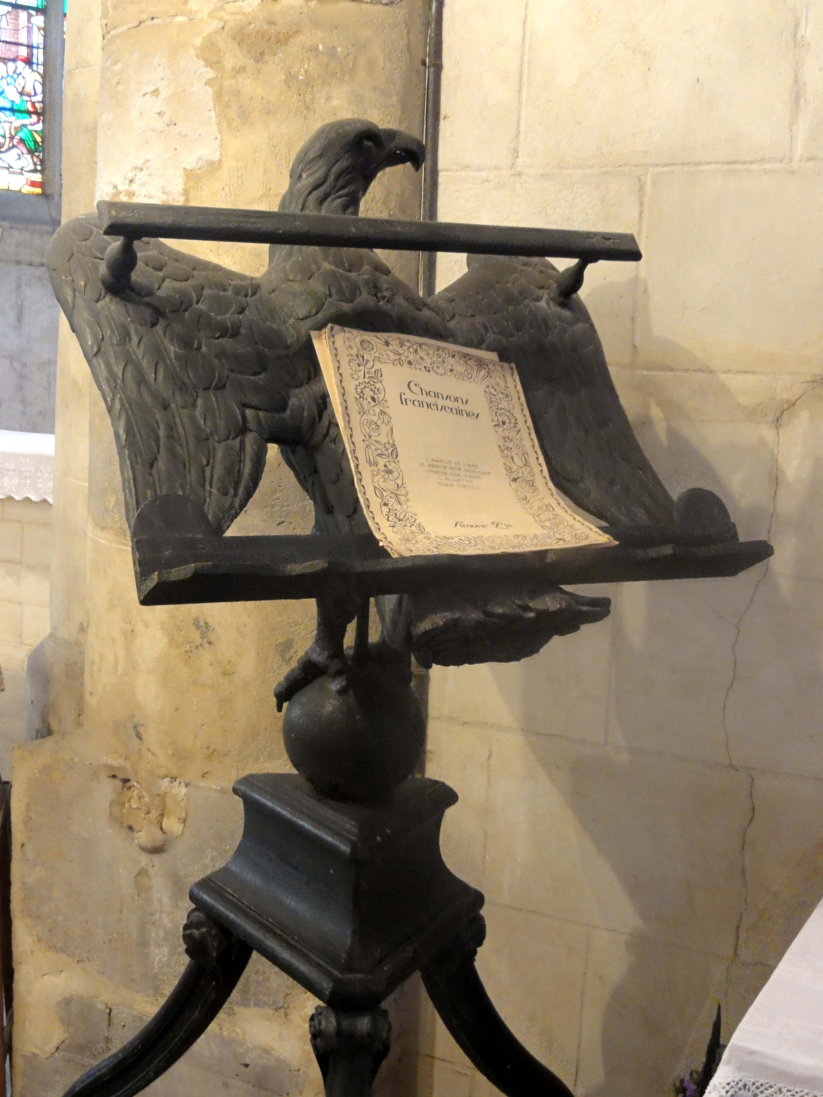 Aigle-lutrin.